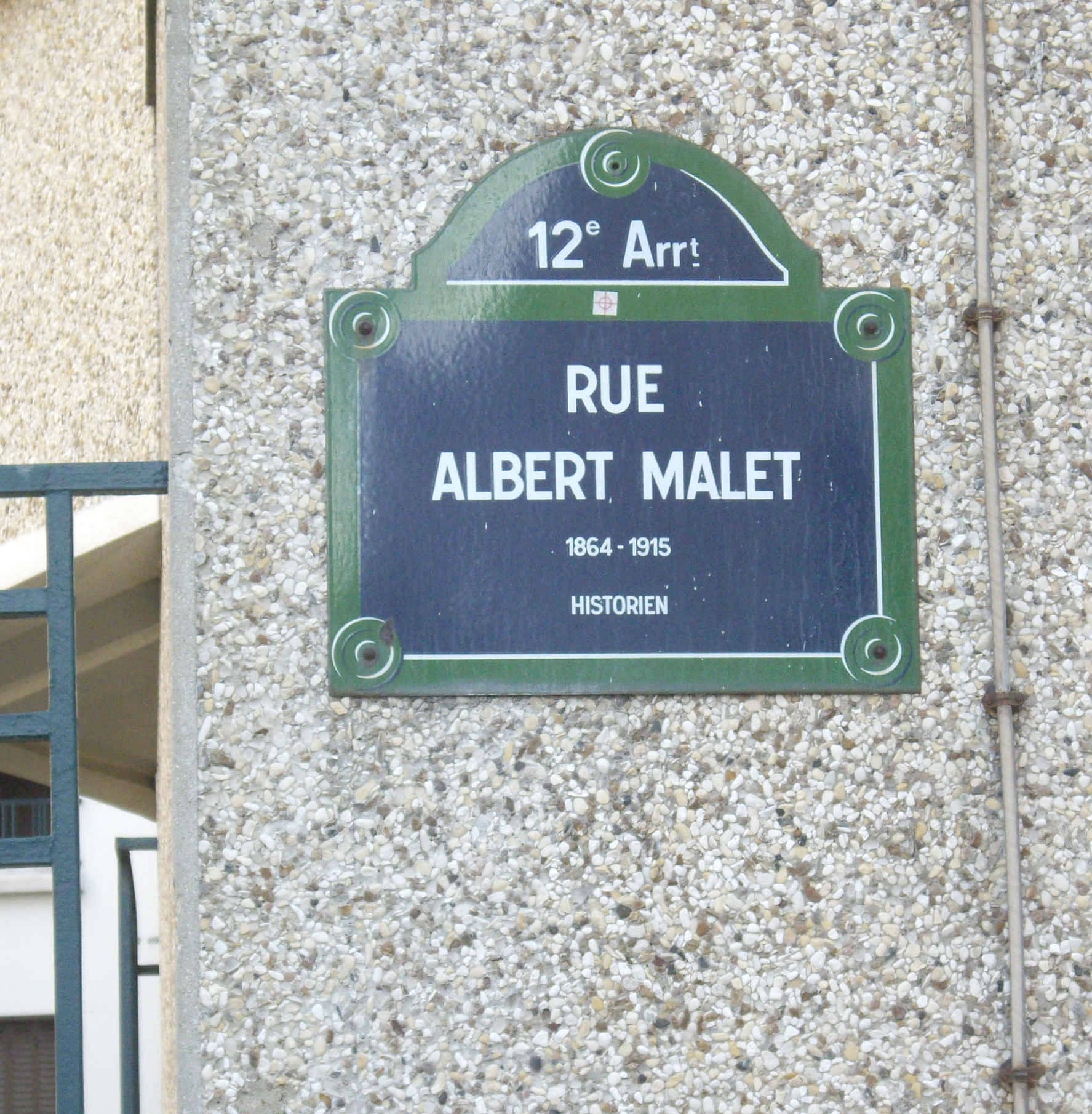 Rue Albert-Malet, Paris 12e. « Albert Malet, 1864-1915, historien. »